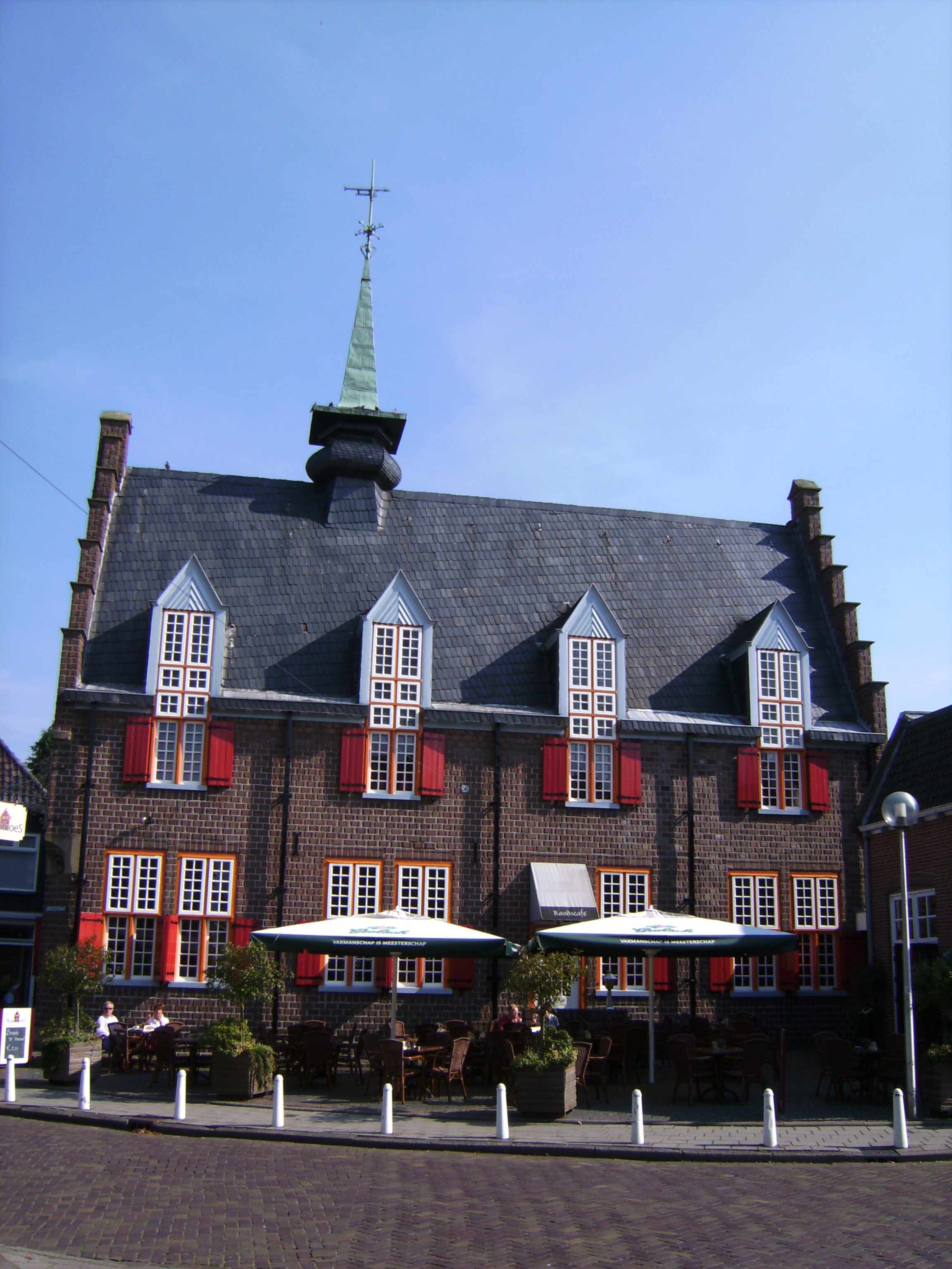 Tubbergen, oude raadhuis (old town hall)